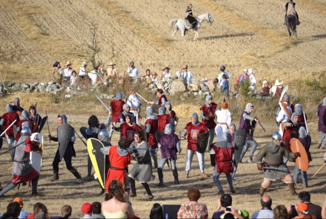 Representación de la Batalla de Atapuerca entre castellanos y leoneses